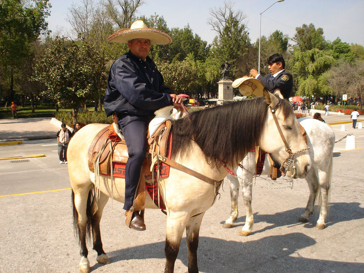 POLICIA CHARRA DEL D. F.